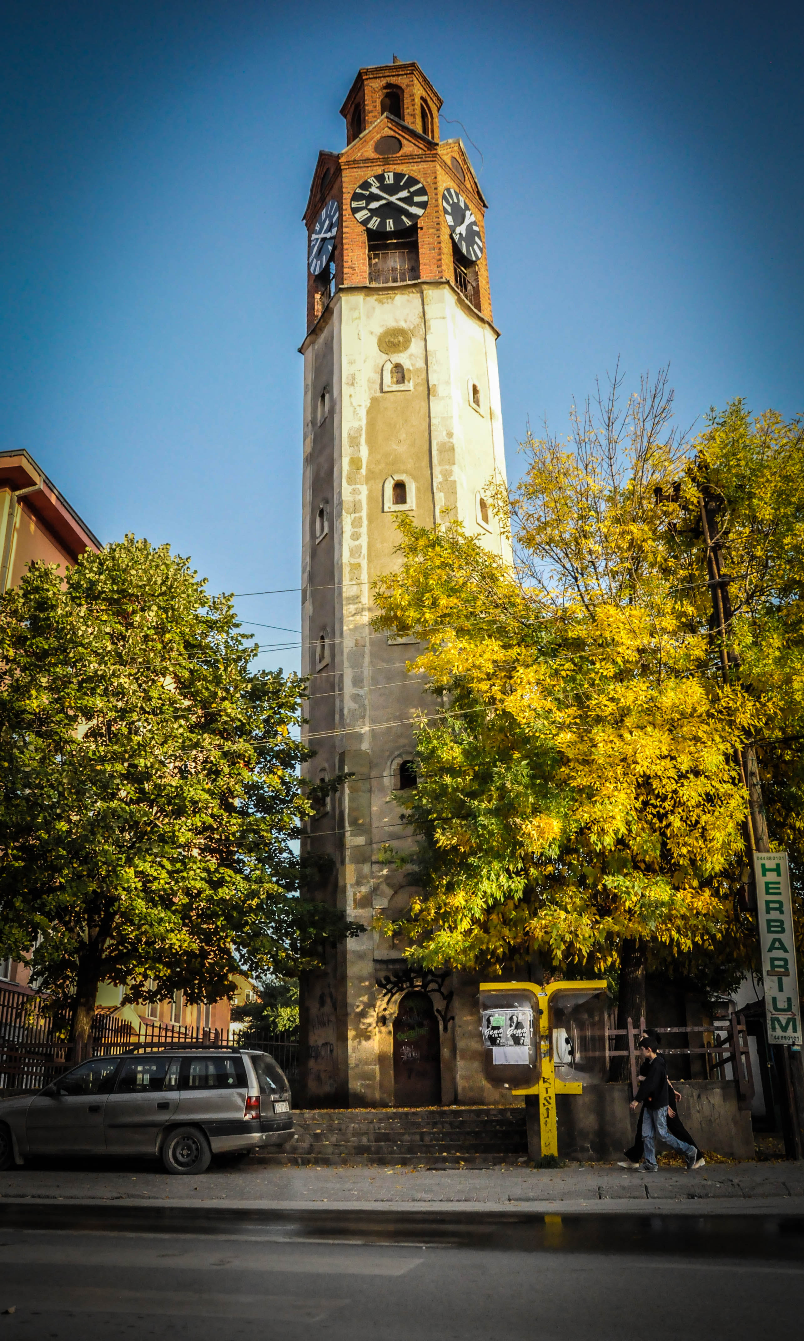 Sahat Kulla